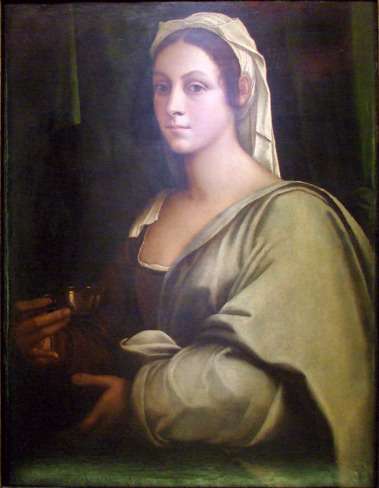 Lucrezia d'Alagno (1430−1479) or Vittoria_Colonna // Painting from monastery: i frati Cappuccini nel Lazio